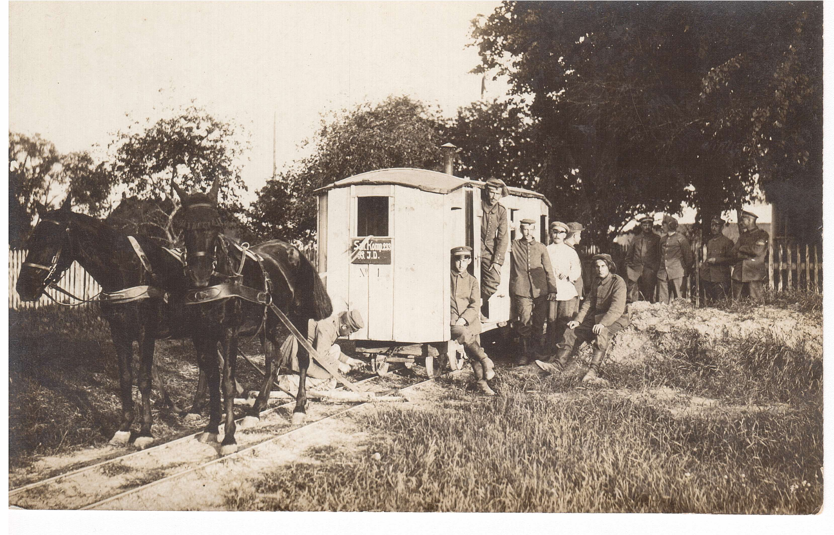 Sanitäts Kompanie 233 in der 93. Infanterie Division. Die 93. Inf.Div. wurde im Okt. 1916 aufgestellt, der Div.-Gefechtskalender sagt dazu folgendes: 01.10.16 - 05.12.17 = Stellungskämpfe an der Beresina 21.03.1917 = Angfriffsgefecht b. Sabresina 19.07. - 27.07.17 = Abwehrschlacht bei Smorgon-Krewo 17.12.17 - 18.02.1918 = Waffenstillstand